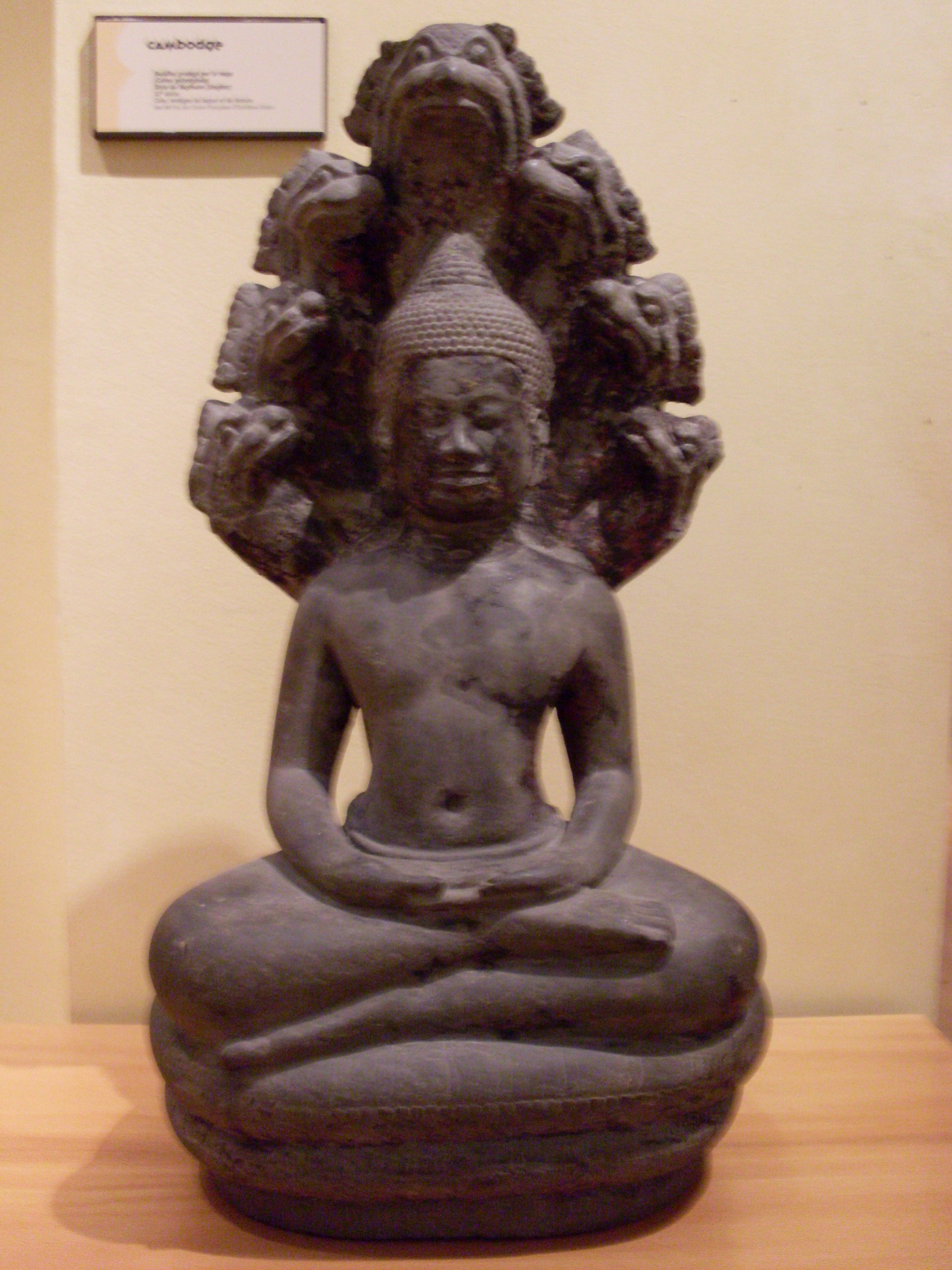 Buddha protégé par le naga (Cobra polycéphal), Cambodge, style du Baphuon (Angkor) 11e siècle, grès vestiges de laque et de dorure. Musée George Labit, Toulouse, France